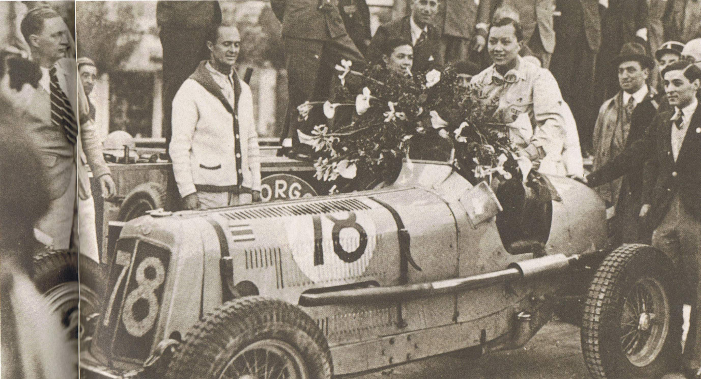 พระวรวงศ์เธอ พระองค์เจ้าพีรพงศ์ภาณุเดช ทรงรับถ้วยรางวัลชนะเลิศ รายการโมนาโกกรังปรีซ์ จากเจ้าหลายหลุยส์ เรเนียร์ ที่สนามมอนเตการ์โล ชายที่อยู่ขวามือสุดคือ พระเจ้าวรวงศ์เธอ พระองค์เจ้าจุลจักรพงษ์